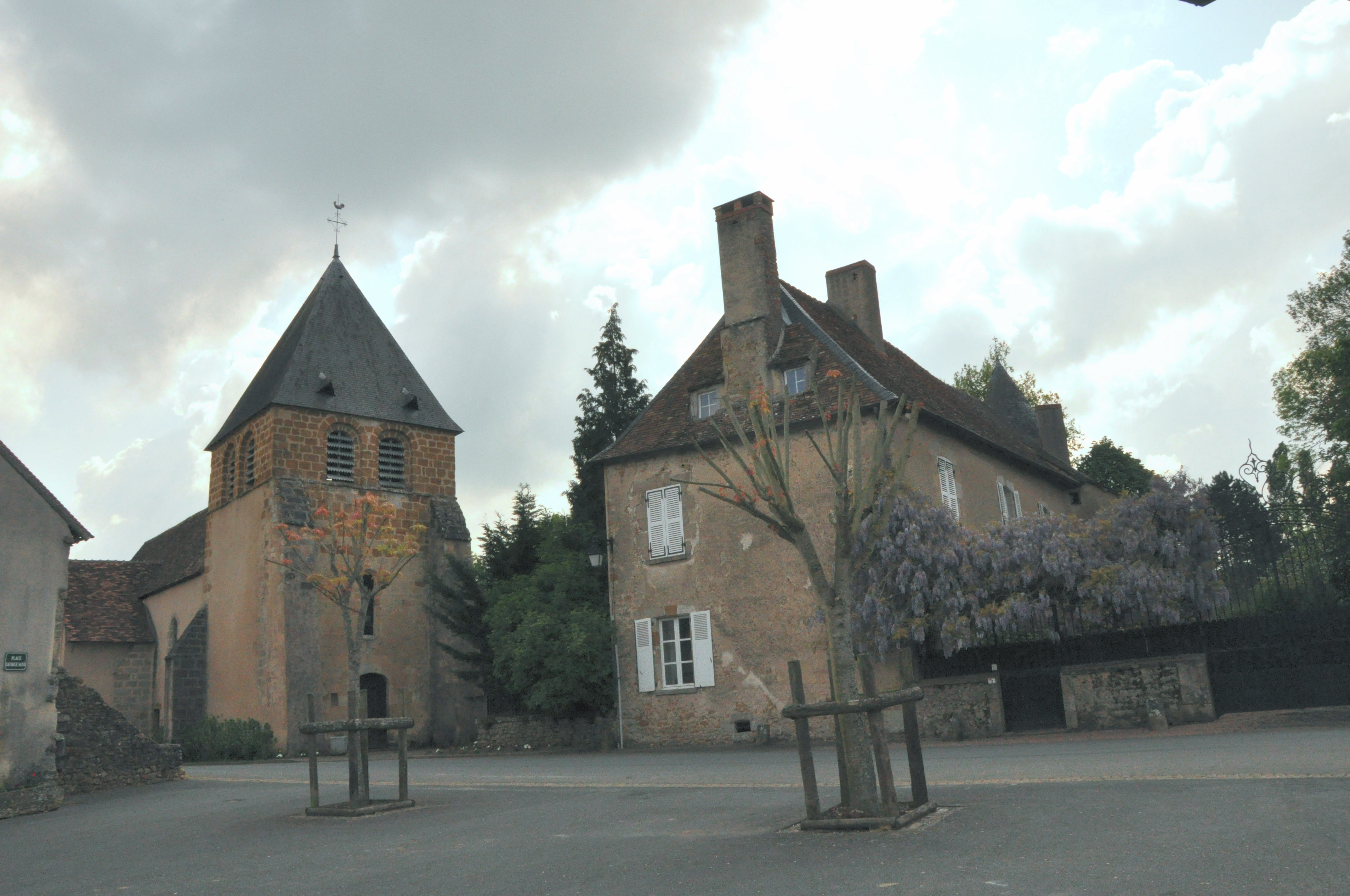 Sacierges-Saint-Martin (Indre) - Place centrale